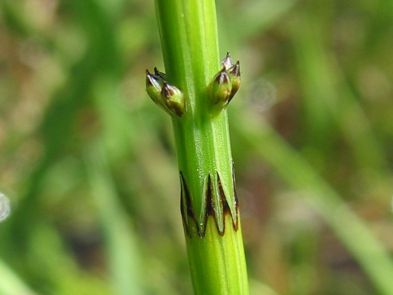 Sumpf-Schachtelhalm Equisetum palustre, Rügen